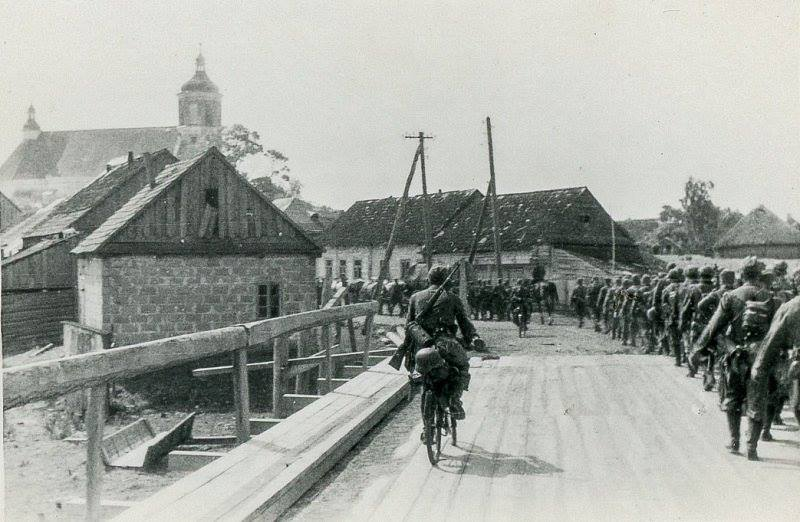 Беларуская (тарашкевіца): Клецак (Klecak), мост цераз раку Лань (Łań)